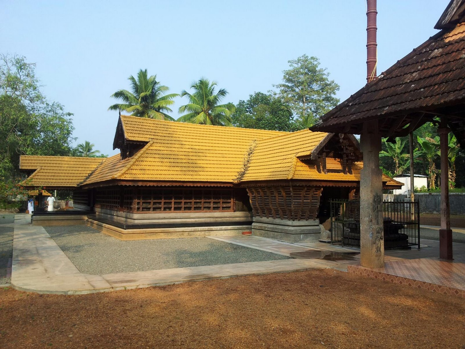 പുതുക്കി പണിത ആനിക്കാട്ടിലമ്മക്ഷേത്രം